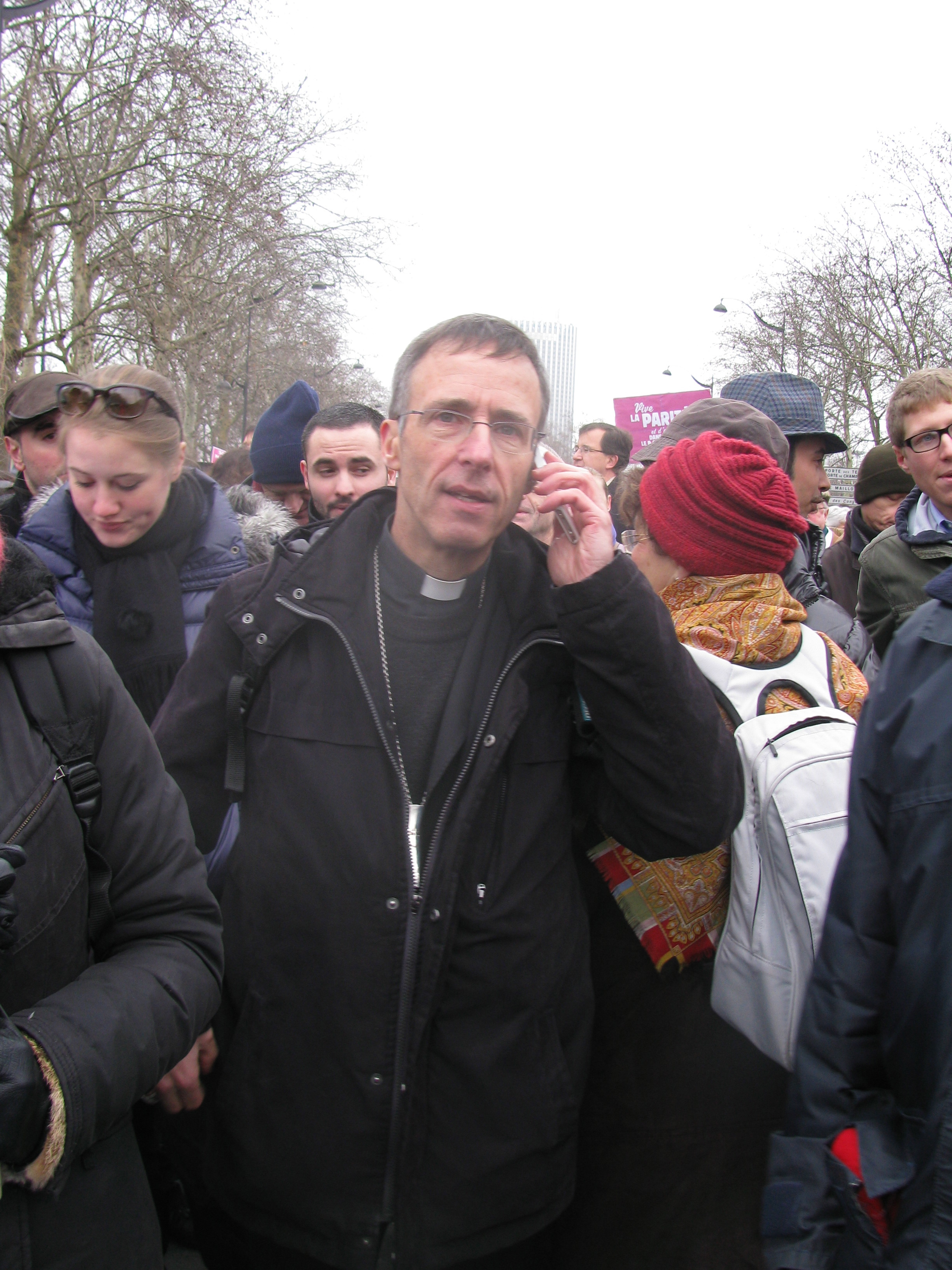 L'Evêque d'Ajaccio sur le terrain